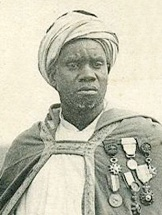 Mademba Seye - 1907 - Fortier. photo après 1890 par A. Pérignon, - Source Gallica